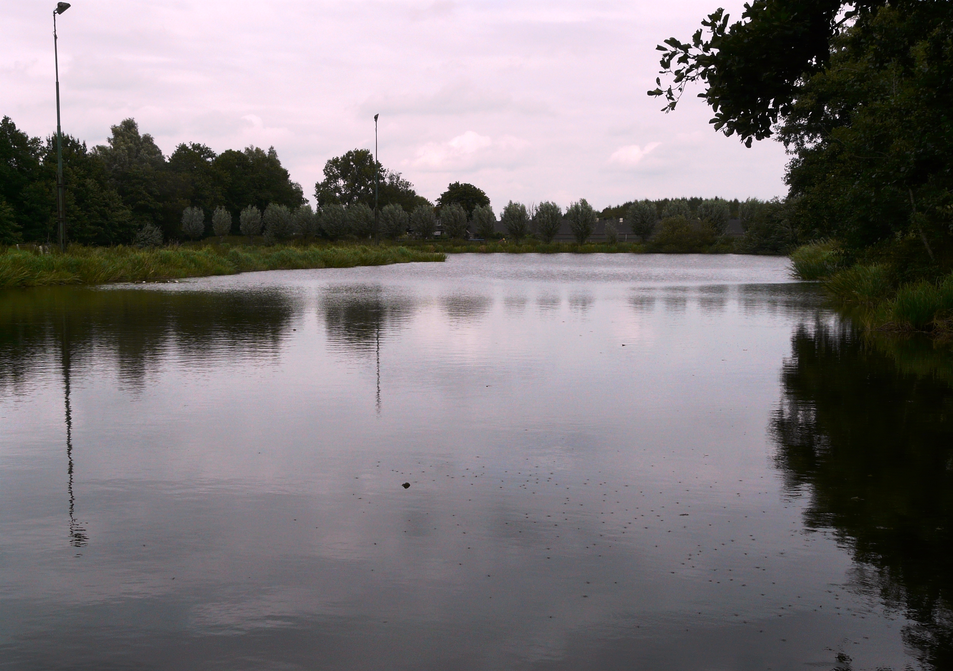 De Blauwe Dobbe, anneks iisbaan, by De Houtigehage